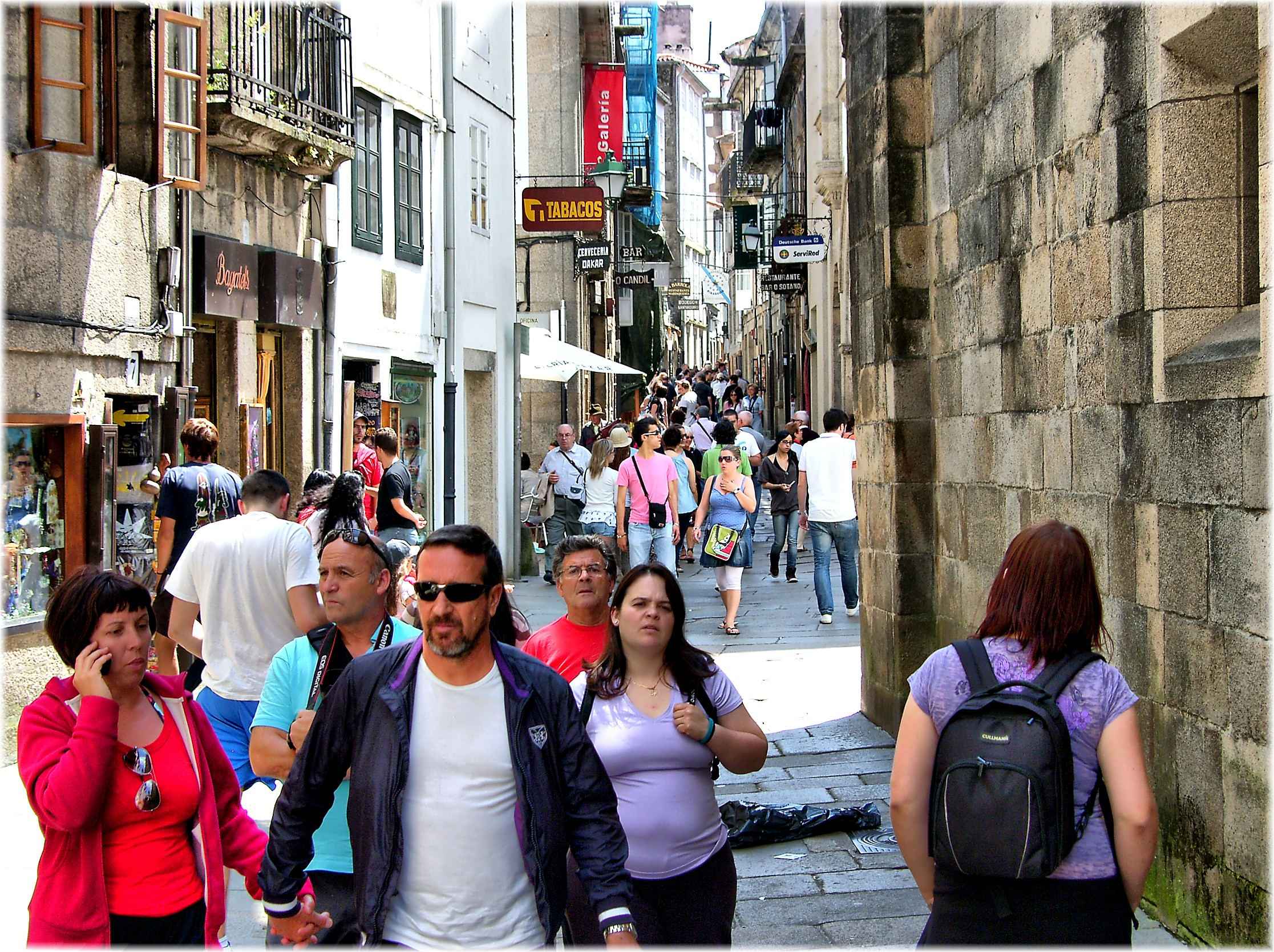 Rúa do Franco-Santiago de Compostela